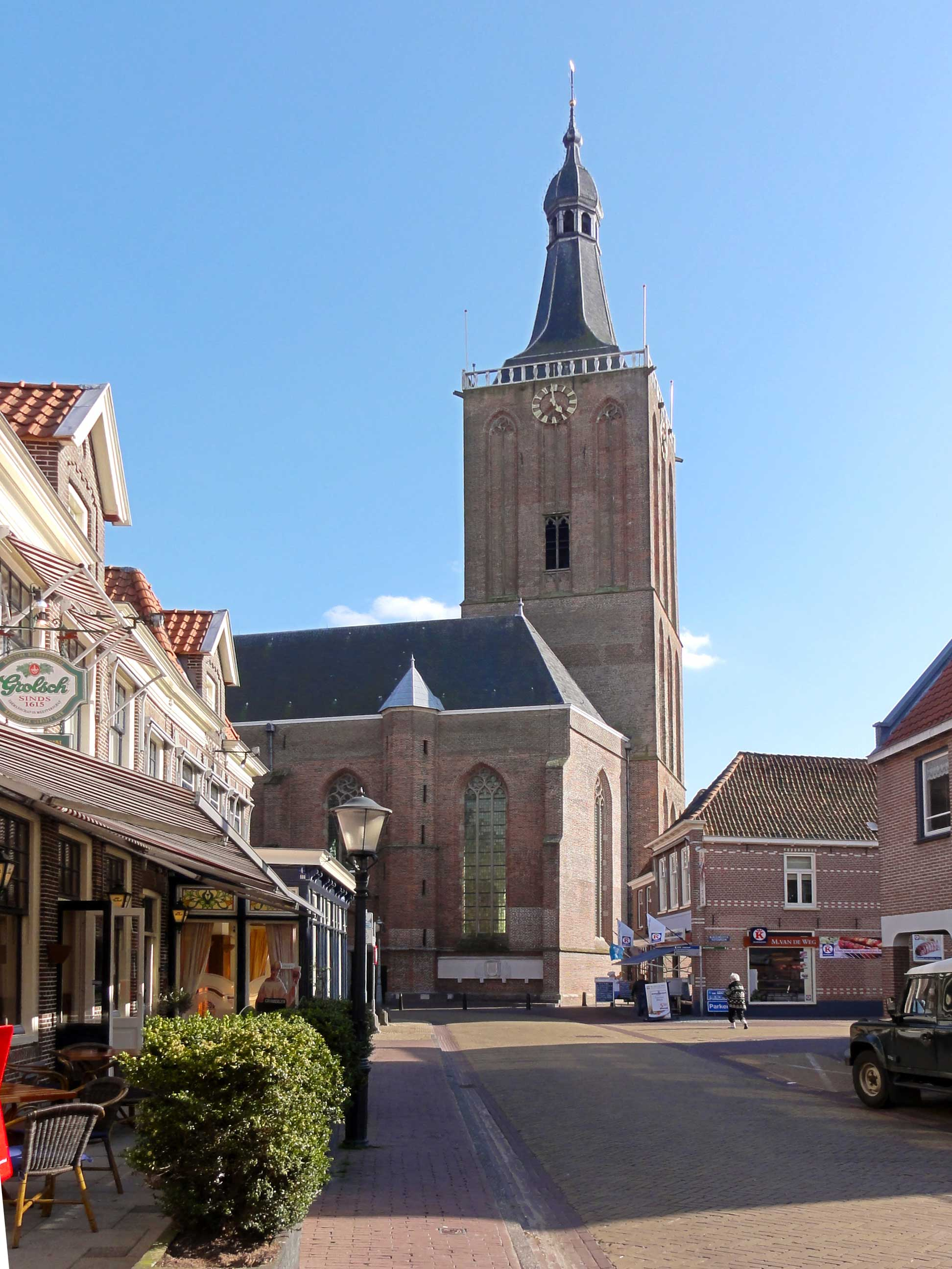 Sint Stephanuskerk in Hasselt (Overijssel)